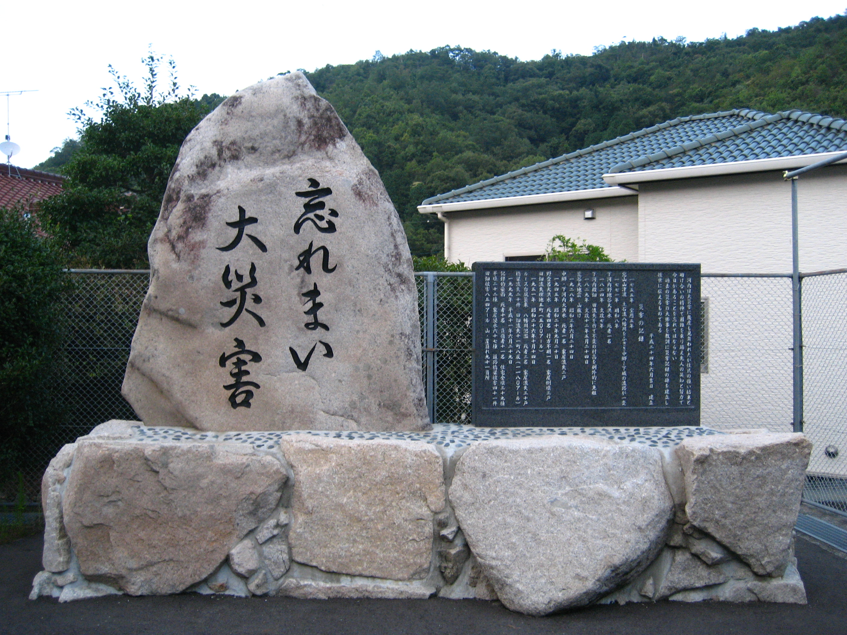 Sekihi In Kochi Kominkan